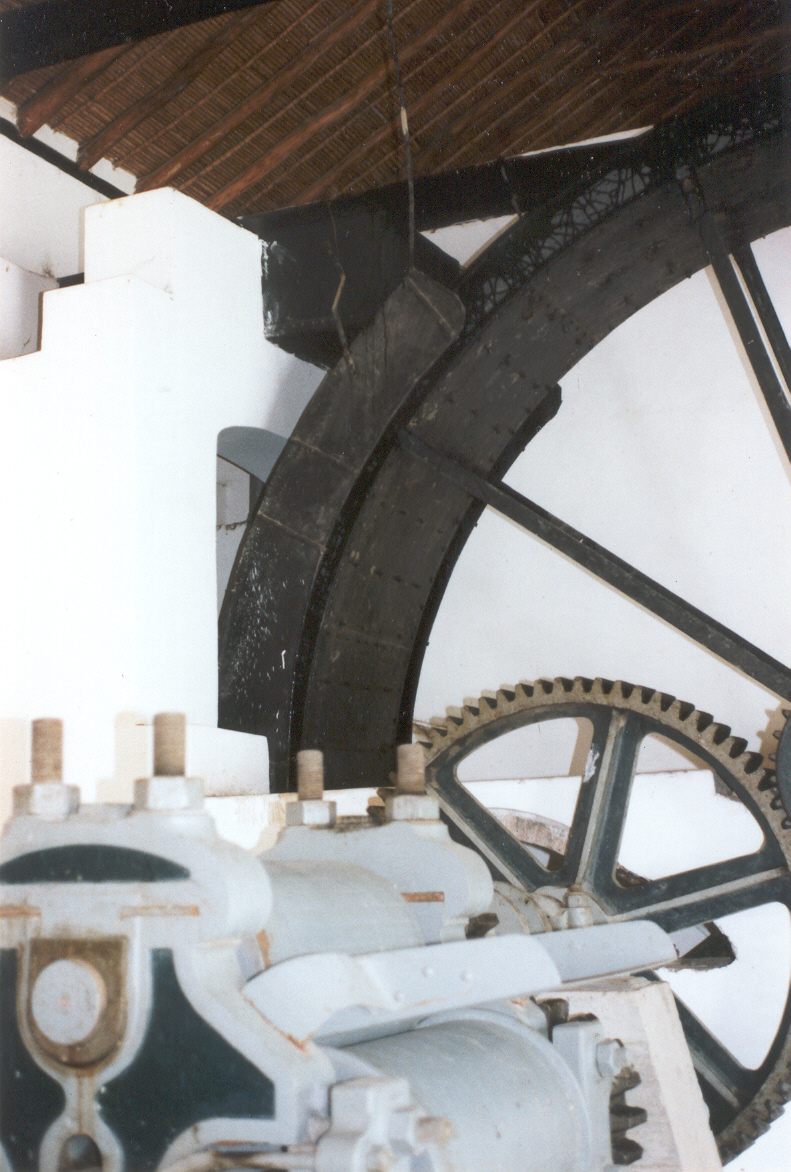 Rueda hidráulica del trapiche en el Ingenio Bolívar (San Mateo, estado Aragua, Venezuela. Marzo 2000. Autor: Fev